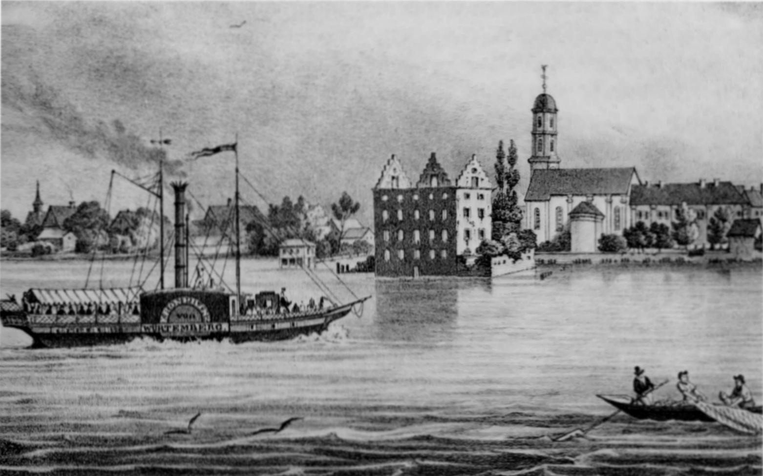 Die Kronprinz von Würtemberg vor dem ausgebrannten Schloss Montfort in Langenargen